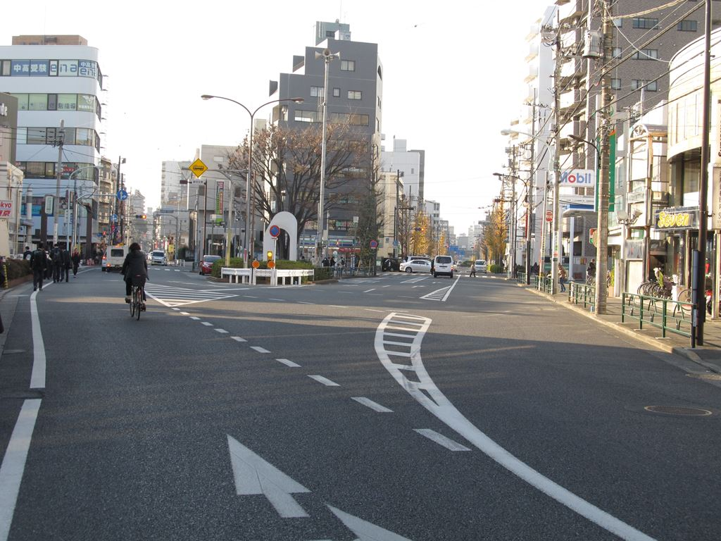 府中市若松町。旧甲州街道。東府中。新甲州街道への三叉路。東京都道229号府中調布線。